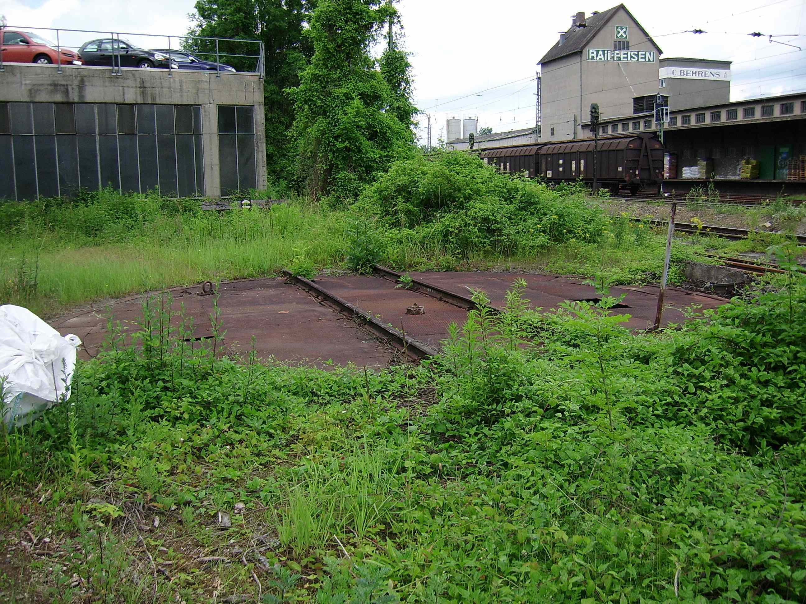 Das hinter das Materiallager der Alfelder Eisenwerke in Alfeld (heute Ammann Asphalt GmbH) führende Gleis führt über eine Drehscheibe (mit Zugang zum Lager) zu einem Prellbock.